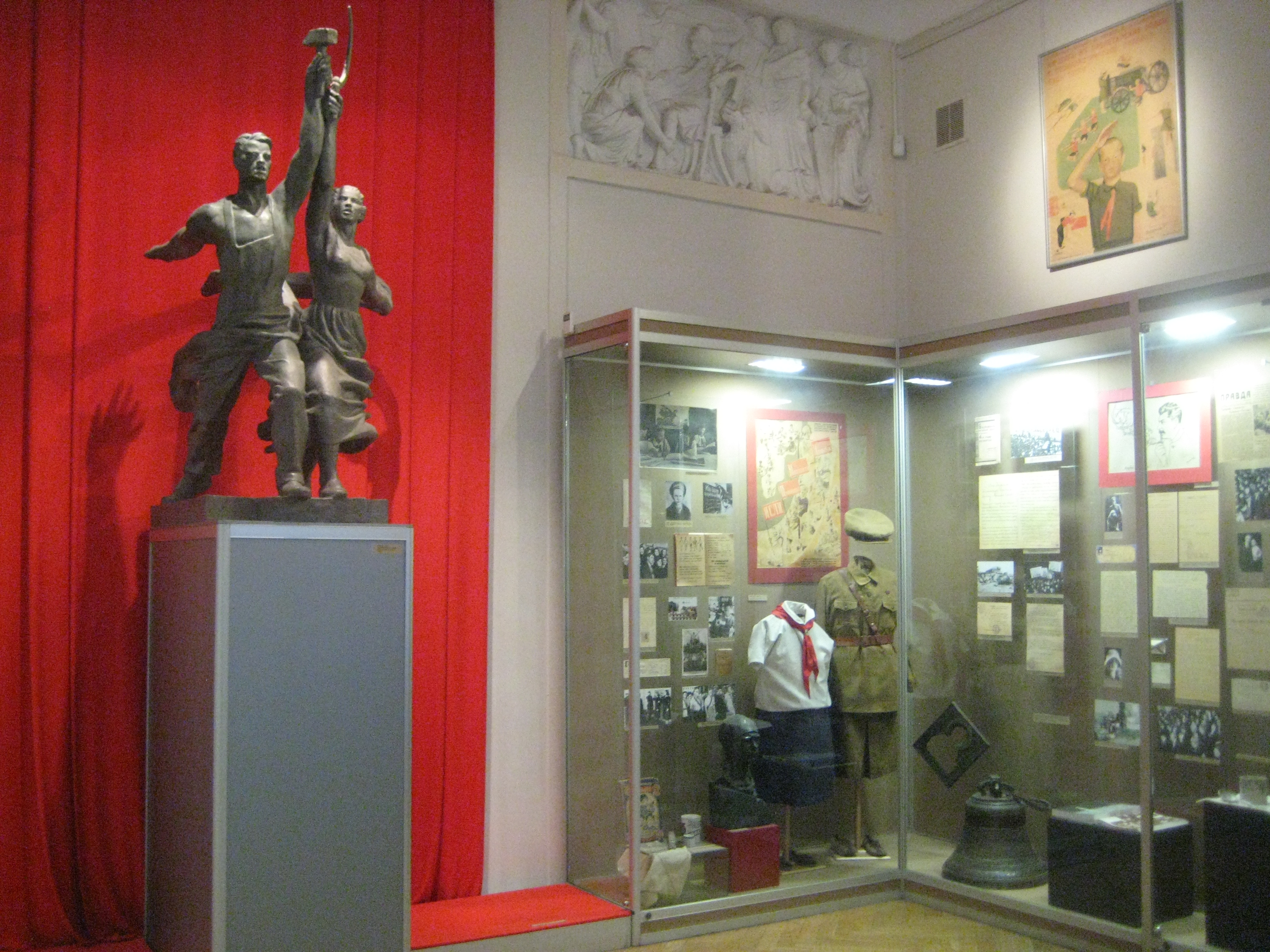 Государственный центральный музей современной истории России